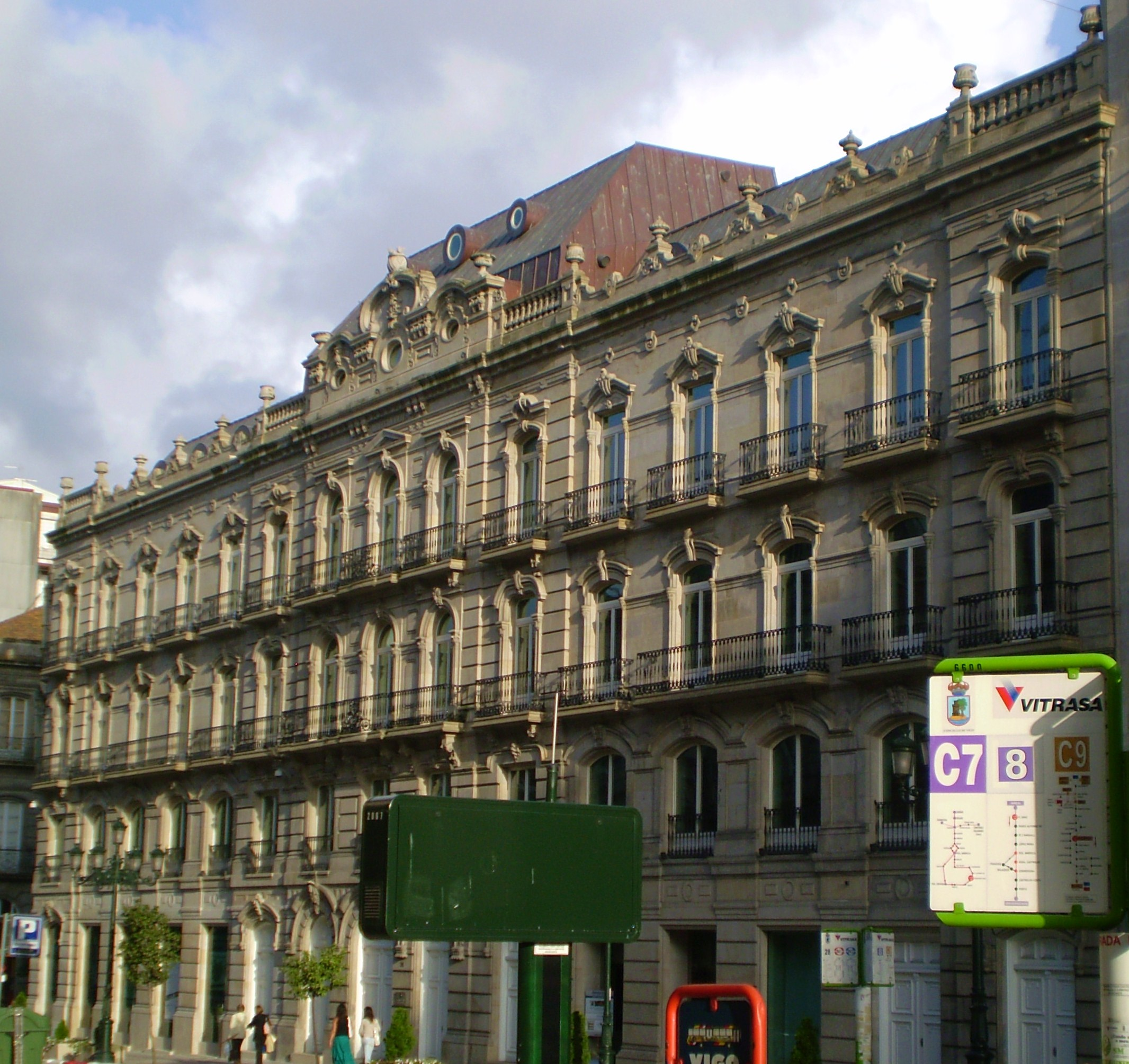 Lateral do Centro Social Afundación Vigo.